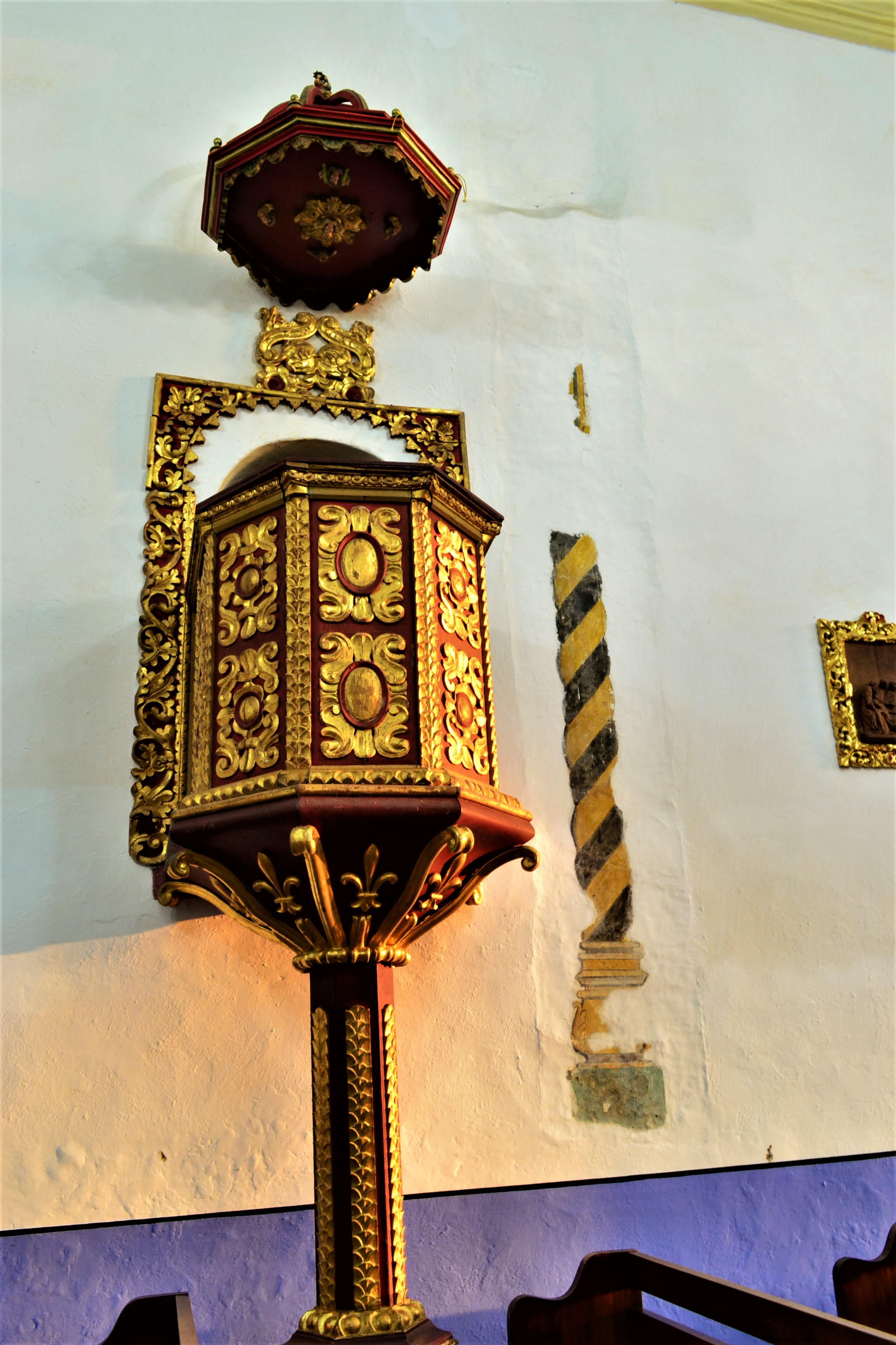 Púlpito de la Ermita de Jesús Nazareno, madera talla y dorada con pan de oro. Siglo XVII